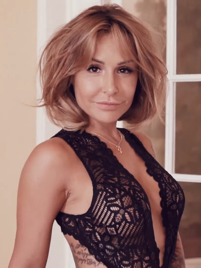 Blanka Lipińska, pisarka (autorka powieści erotycznych).